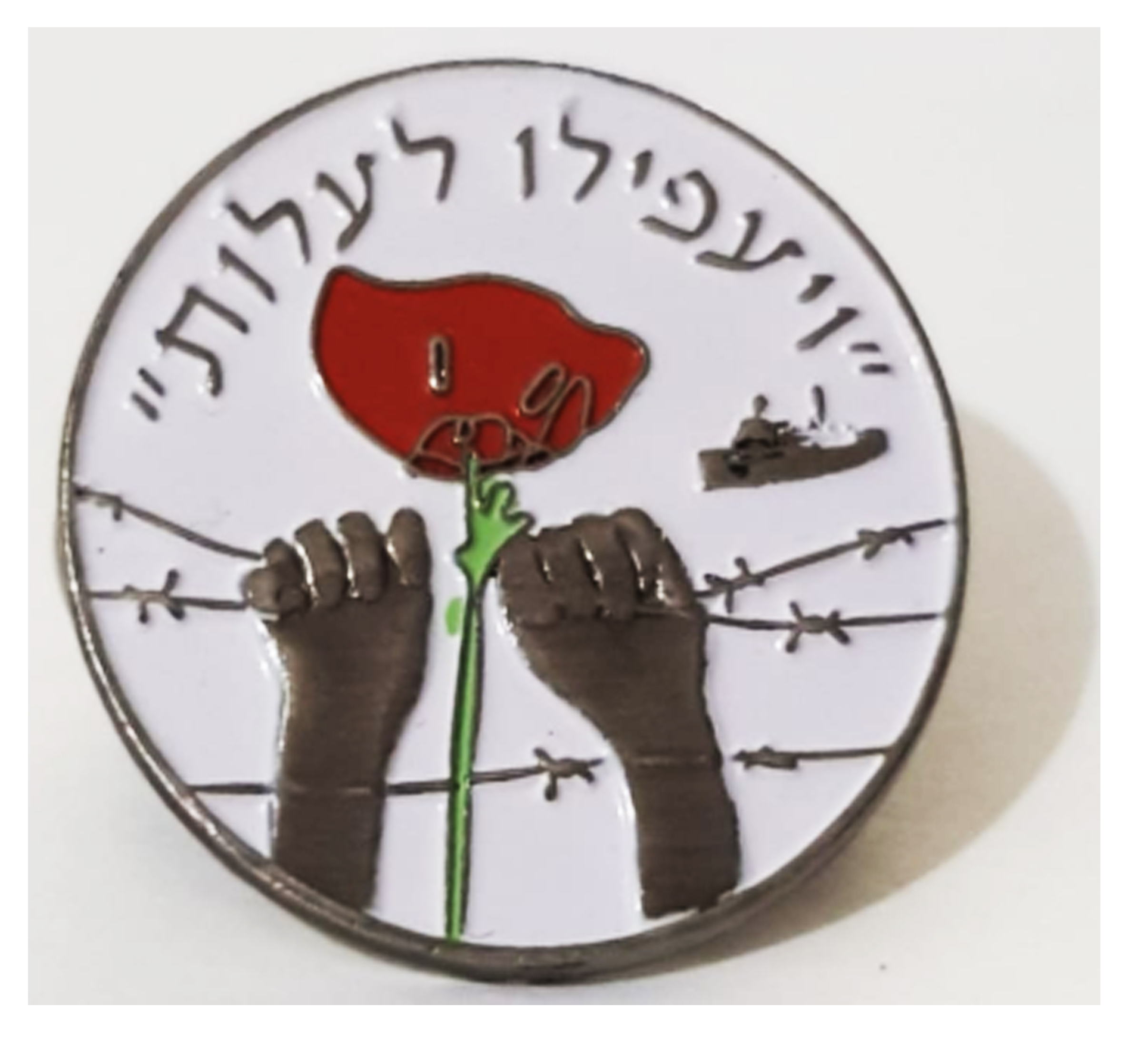 ב-6 במאי 2019 משרד המורשת וירושלים ברשות השר זאב אלקין הוקיר את גבורת המעפילים שהעפילו בים, ביבשה ובאוויר